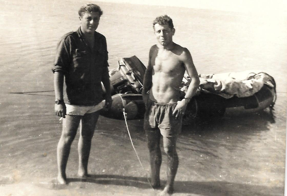 שי גורן ואריה יצחק עם סירת גומי